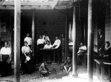 Tipografía Industrial (Fotografía de Benjamín de la Calle, Centro de Memoria Visual, FAES)